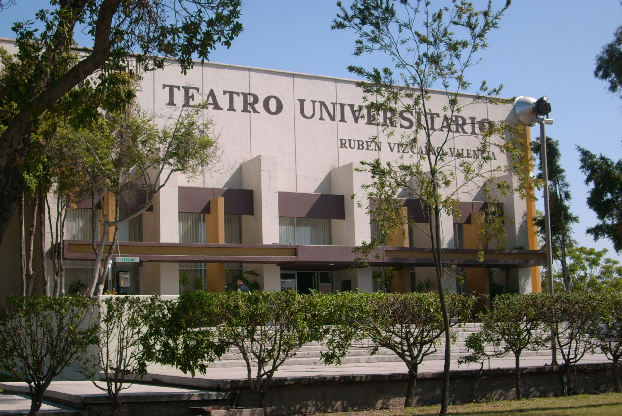 Teatro Rubén Vizcaíno Valencia — de la UABC Campus Tijuana.